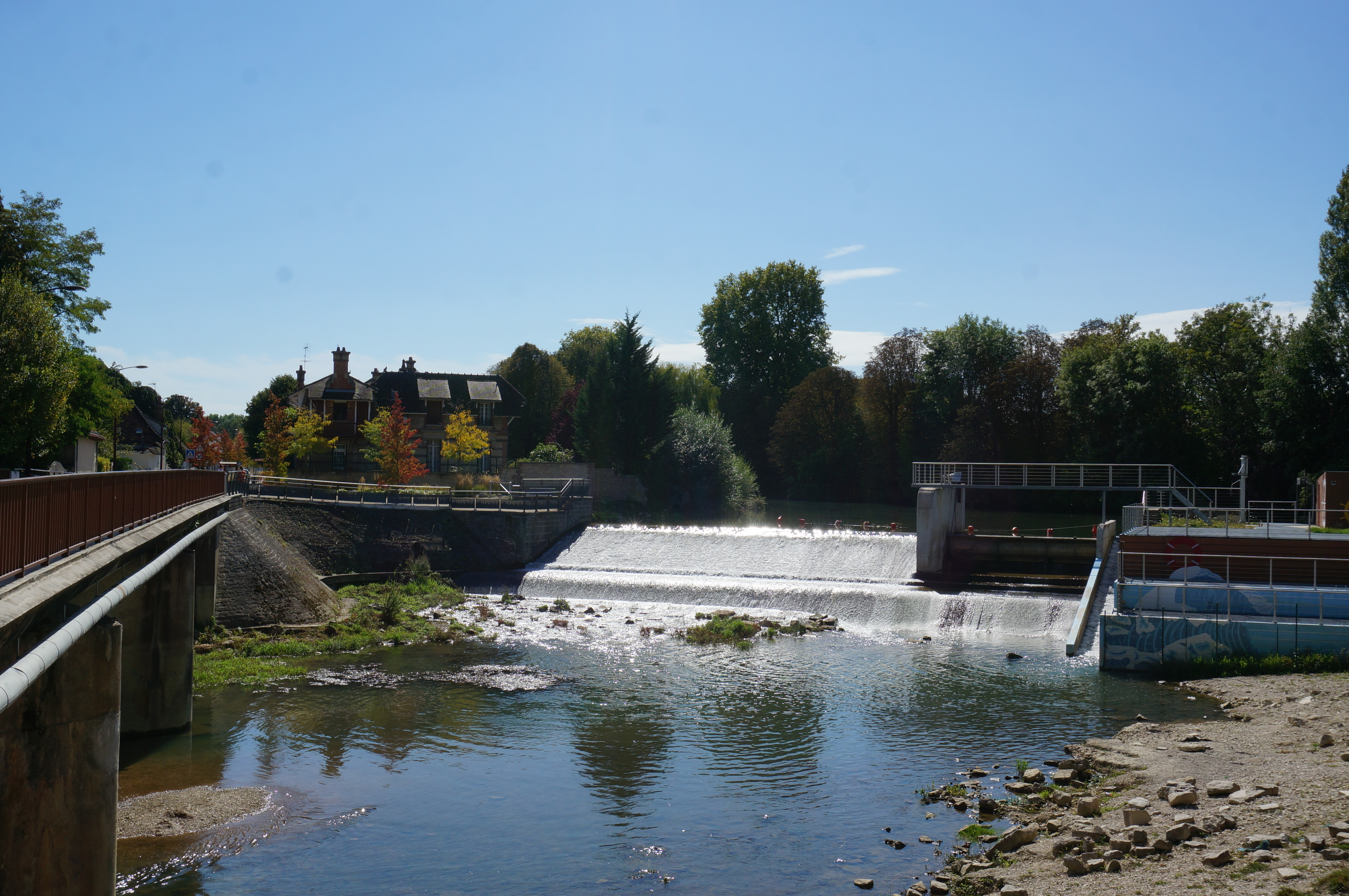 La Vieille Seine au déversoir de Saint-Julien-les-Villas et le pont sur la Seine - RD 49.